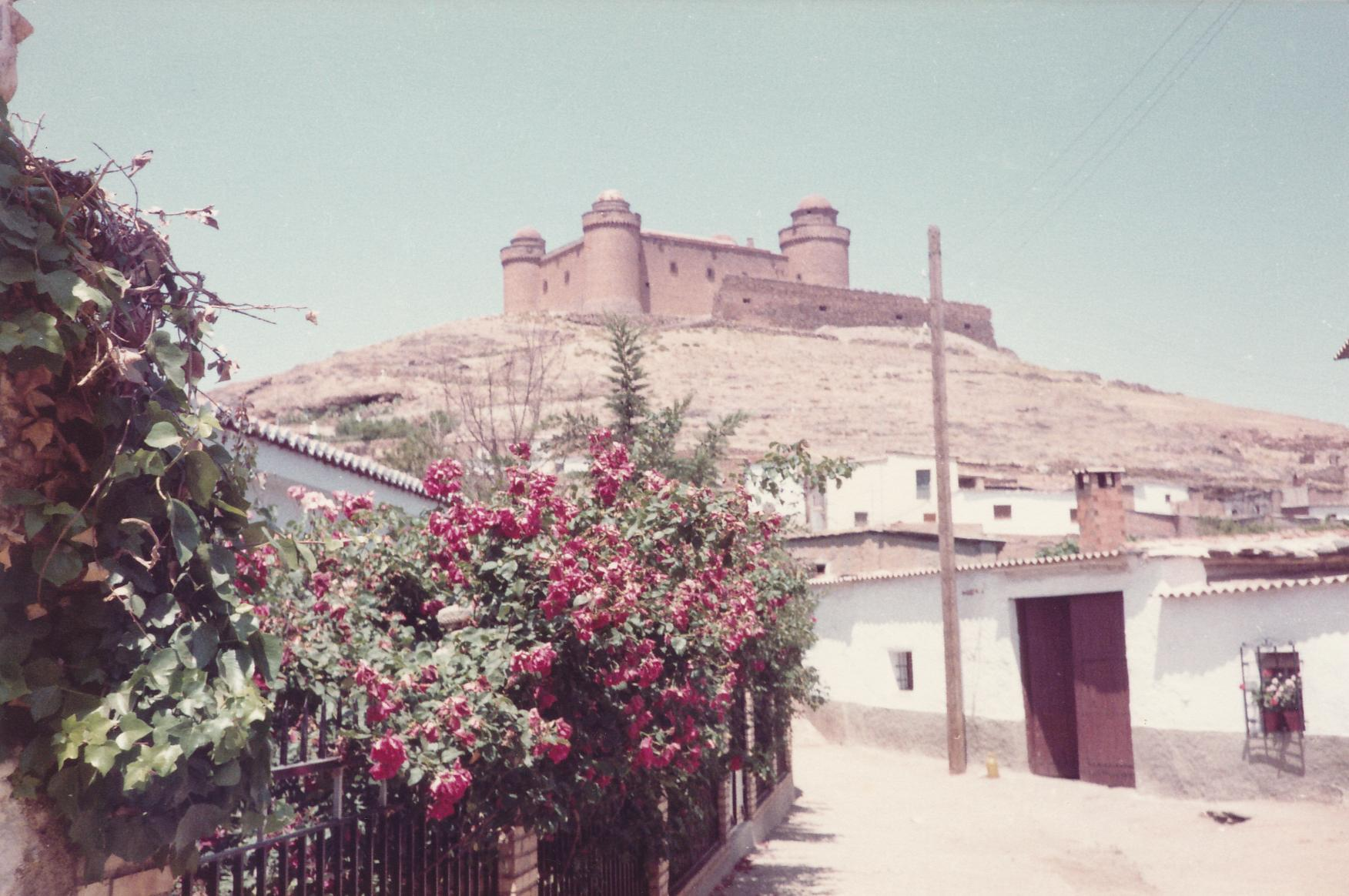 Das mächtige Castillo de La Calahorra Datum: 09/1984 Urheber: Michael Pfeiffer privates Fotoalbum des Urhebers